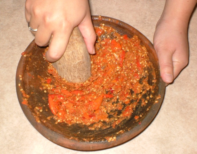 Sambal Olek